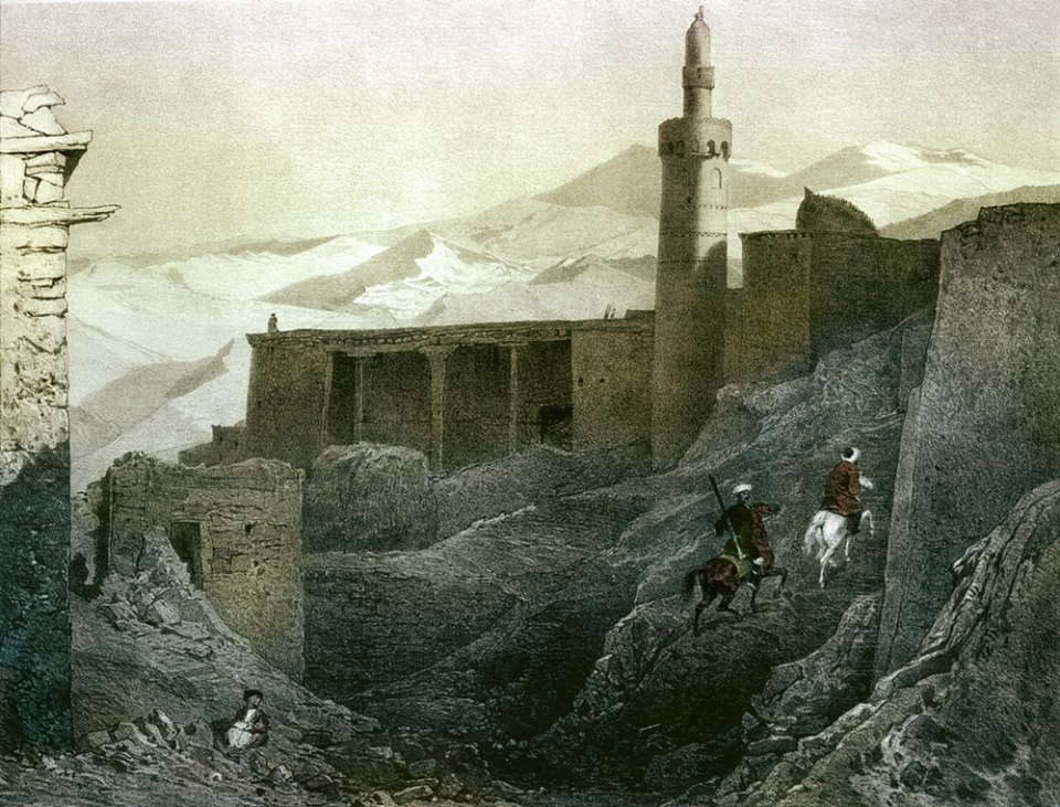 Daghestan meridional. Mosquee de Ritcha.